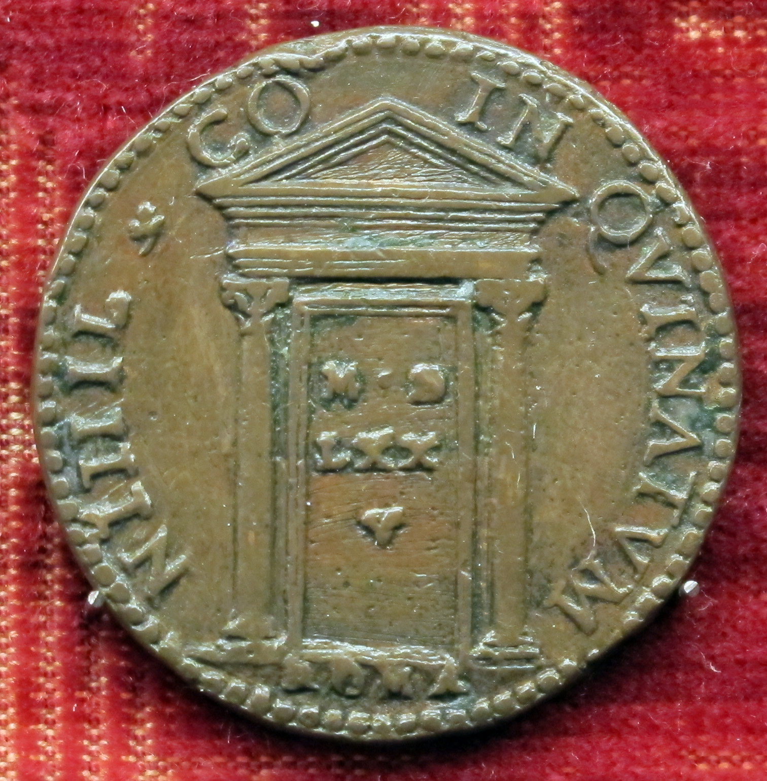 Medaglia papale